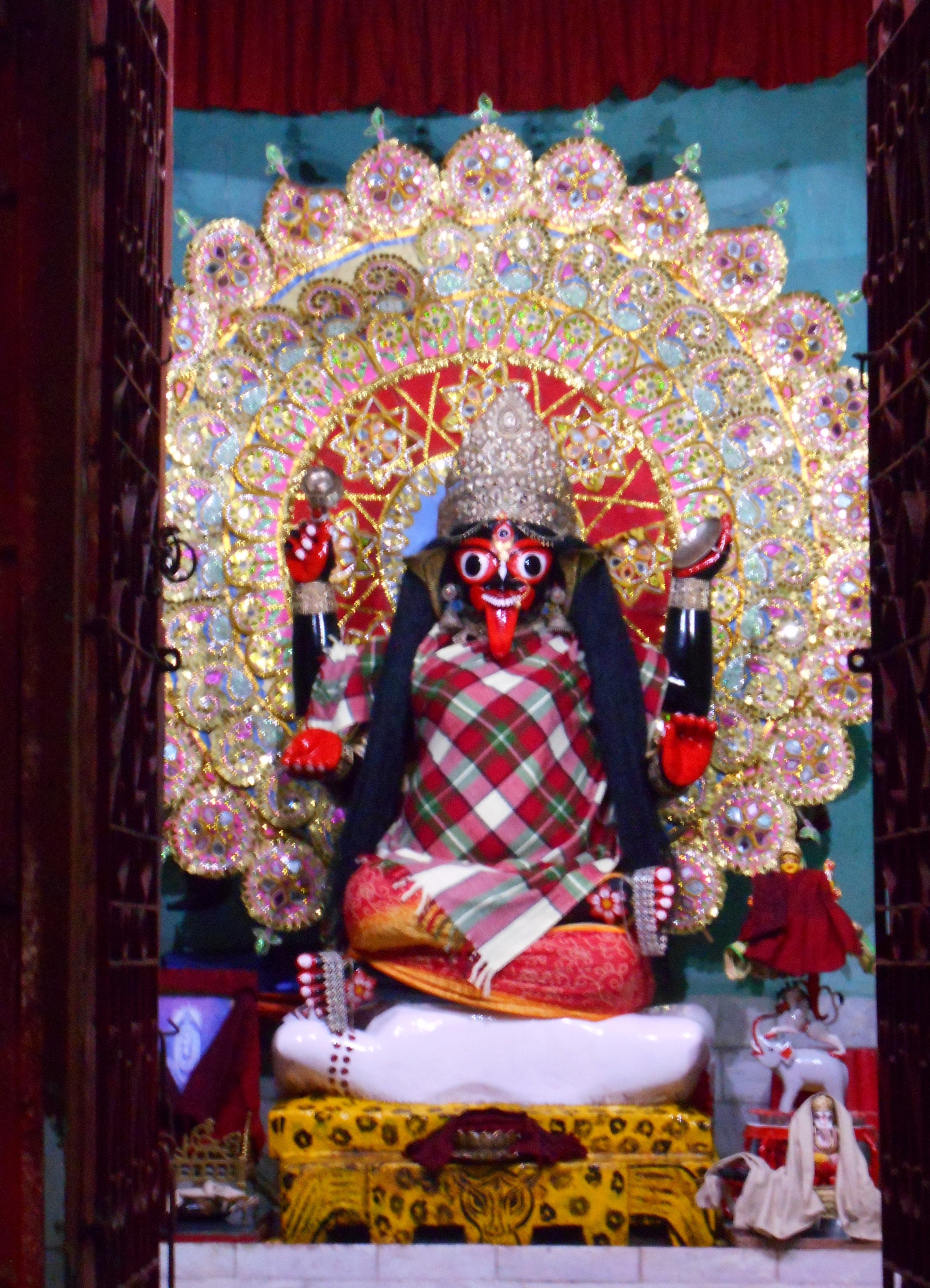 মা ভবতারিণী মাতা